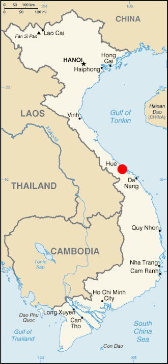 Vietnam Focus Hue Faite à partir de CarteVietnam.png